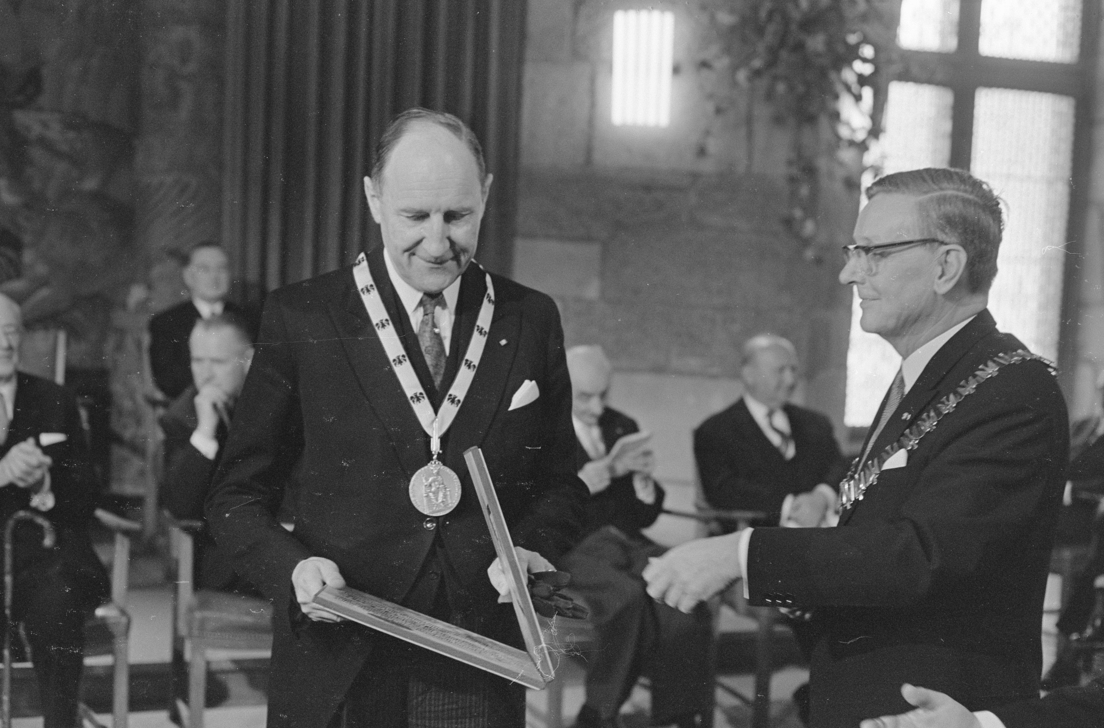 Collectie / Archief : Fotocollectie Anefo Reportage / Serie : [ onbekend ] Beschrijving : Minister Luns ontvangt Karel de Grote prijs Datum : 4 mei 1967 Trefwoorden : ministers, ontvangsten, prijzen Persoonsnaam : Karel de Grote Prijs, Luns, J.A.M.H., Luns, Joseph Fotograaf : Kroon, Ron / Anefo Auteursrechthebbende : Nationaal Archief Materiaalsoort : Negatief (zwart/wit) Nummer archiefinventaris : bekijk toegang 2.24.01.05 Bestanddeelnummer : 920-3008